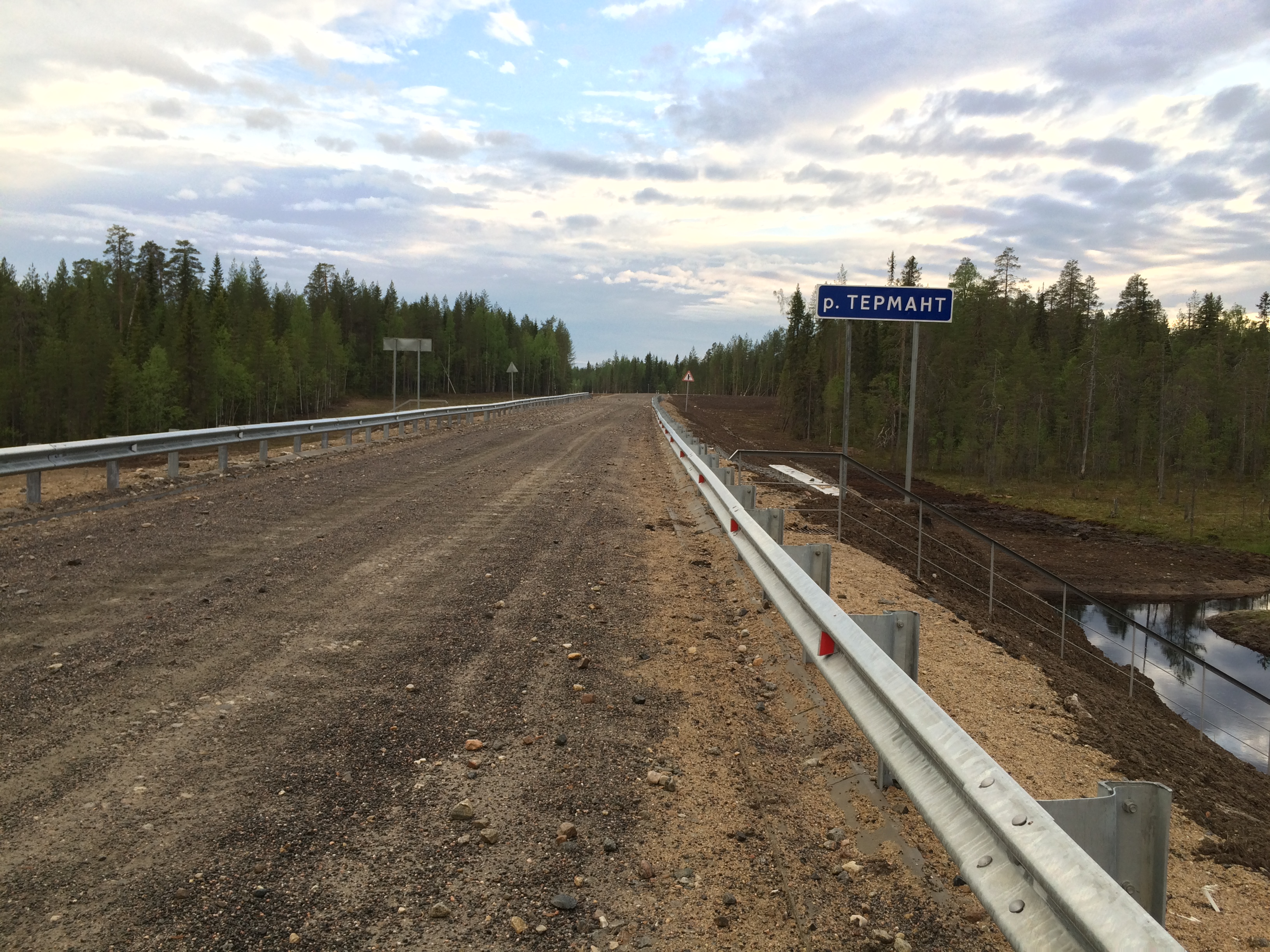 р. Термант